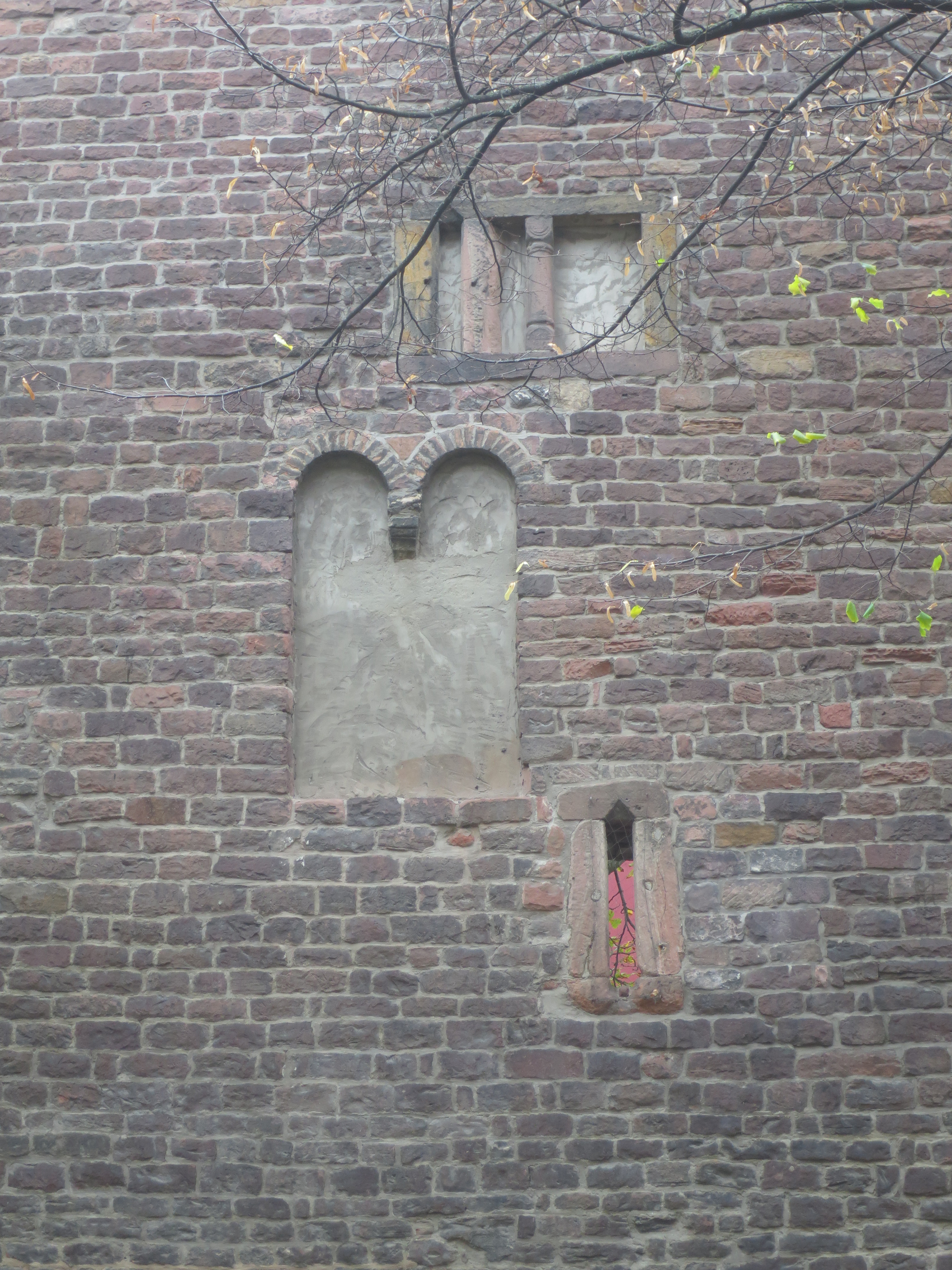 Stadtmauer Worms, Nordanlage: Zugesetzte Fenster